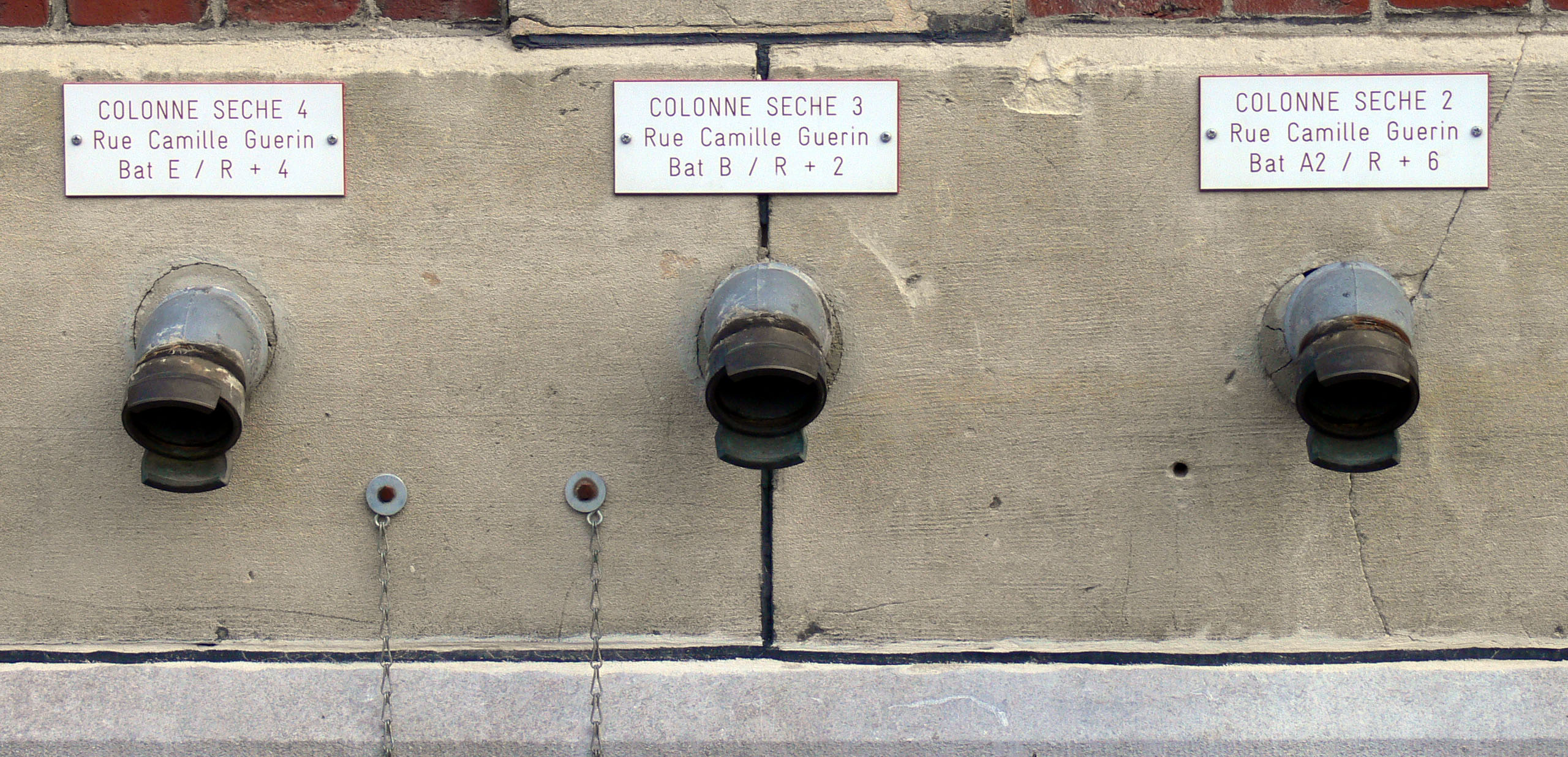 Colonnes sèches (Lille, France)